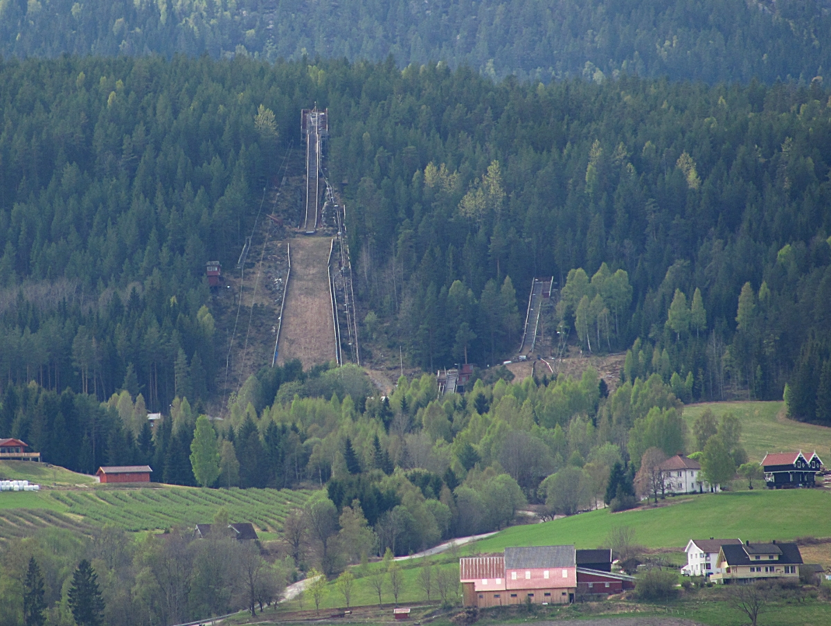 Tveitanbakken set fra Notodden.